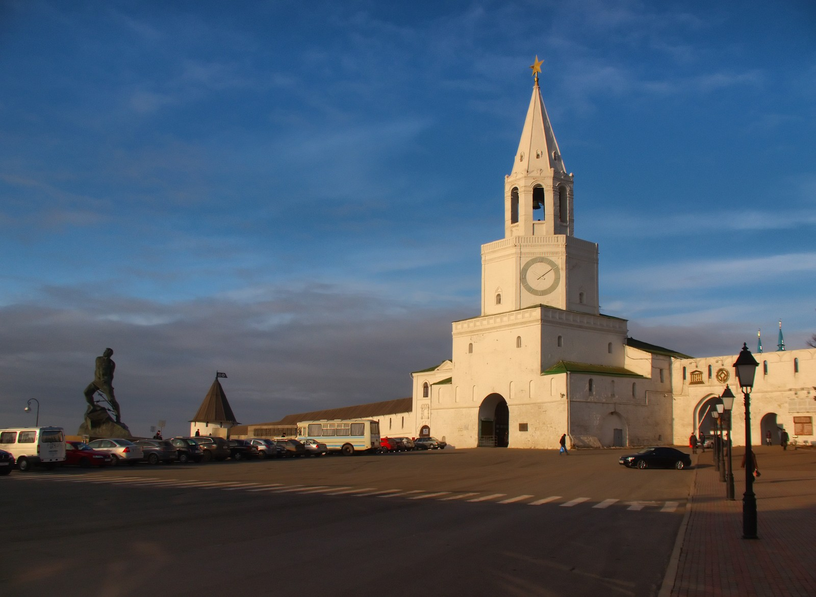 Спасская башная казанского Кремля